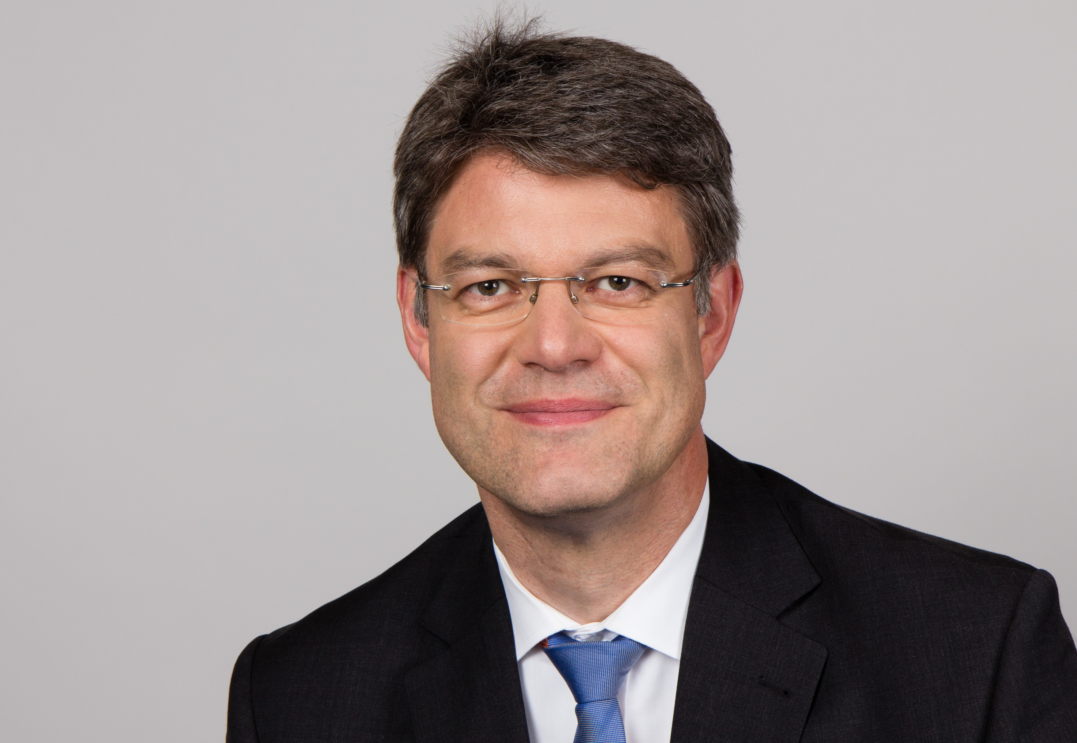 Patrick Schnieder (* 1. Mai 1968 in Kyllburg) ist deutscher Politiker (CDU) und seit 2009 Mitglied des Deutschen Bundestages. Schnieder war von 1999 bis 2009 Bürgermeister in der Verbandsgemeinde Arzfeld, bevor er in den Bundestag wechselte. Er hat an der Rheinischen Friedrich-Wilhelms-Universität in Bonn Rechtswissenschaften studiert und ist Volljurist. Wikipedia-Bundestagsprojekt 2014 8–12 September 2014 in BerlinThis file was taken during the project “Wiki loves parliaments/Bundestag 2014” (German). Organisation: Martin Rulsch, Olaf KosinskyDesign: Martin KraftPhotography: Foto-AG Gymnasium Melle (Jan-Kristof Blömke, Lukas Eismann, Moritz Kosinsky, Laura Lessing, Karsten Mosebach, Mascha Mosebach, Teresa Schreer, Noah Sewöster, Niklas Tschöpe), Olaf Kosinsky, Martin Kraft, Harald Krichel, Steffen Prößdorf, Ralf Roletschek, Martin Rulsch, Gerd Seidel, Sven TeschkeVideo: Marc Rudnick, Manuel SchneiderEditors: Marcus Cyron, Günter Fremuth, Martin Kraft, Robin Krahl, Harald Krichel, Martin Rulsch, WikiAnikaReception: DasMonstaaa, Leonie Rabea Große, Lutheraner, Nina Möllering, Martin Rulsch, WikiAnika, Foto-AG Gymnasium MelleCosmetics: Regina Bosak, Bettina Dieguez, Sandra Kobbe, Andrea Strehlke; Irada Abdullayeva, Vivien Abelmann, Olena Engelbrecht, Sarah Fabini, Nina Magnus, Jacqueline Schmidt, Leonie Taboada, Julia Willer Usage information If you need more information how to use this file, please send an email to . Personality rights warningAlthough this work is freely licensed or in the public domain, the person(s) shown may have rights that legally restrict certain re-uses unless those depicted consent to such uses. In these cases, a model release or other evidence of consent could protect you from infringement claims.